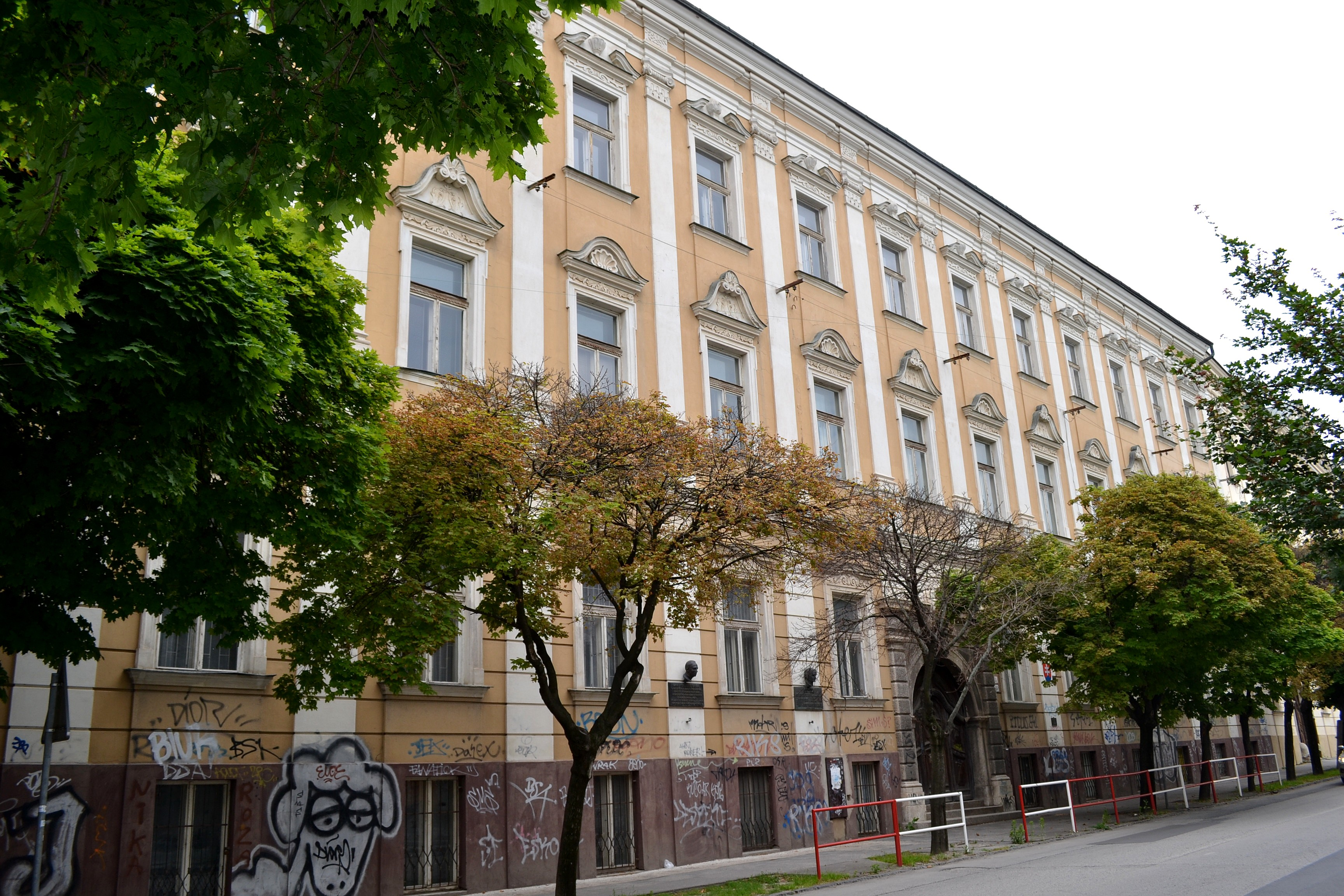 Trnava, komplex univerzitných budov; budova Generálneho seminára (zv. seminár červených klerikov - Rubrorum)